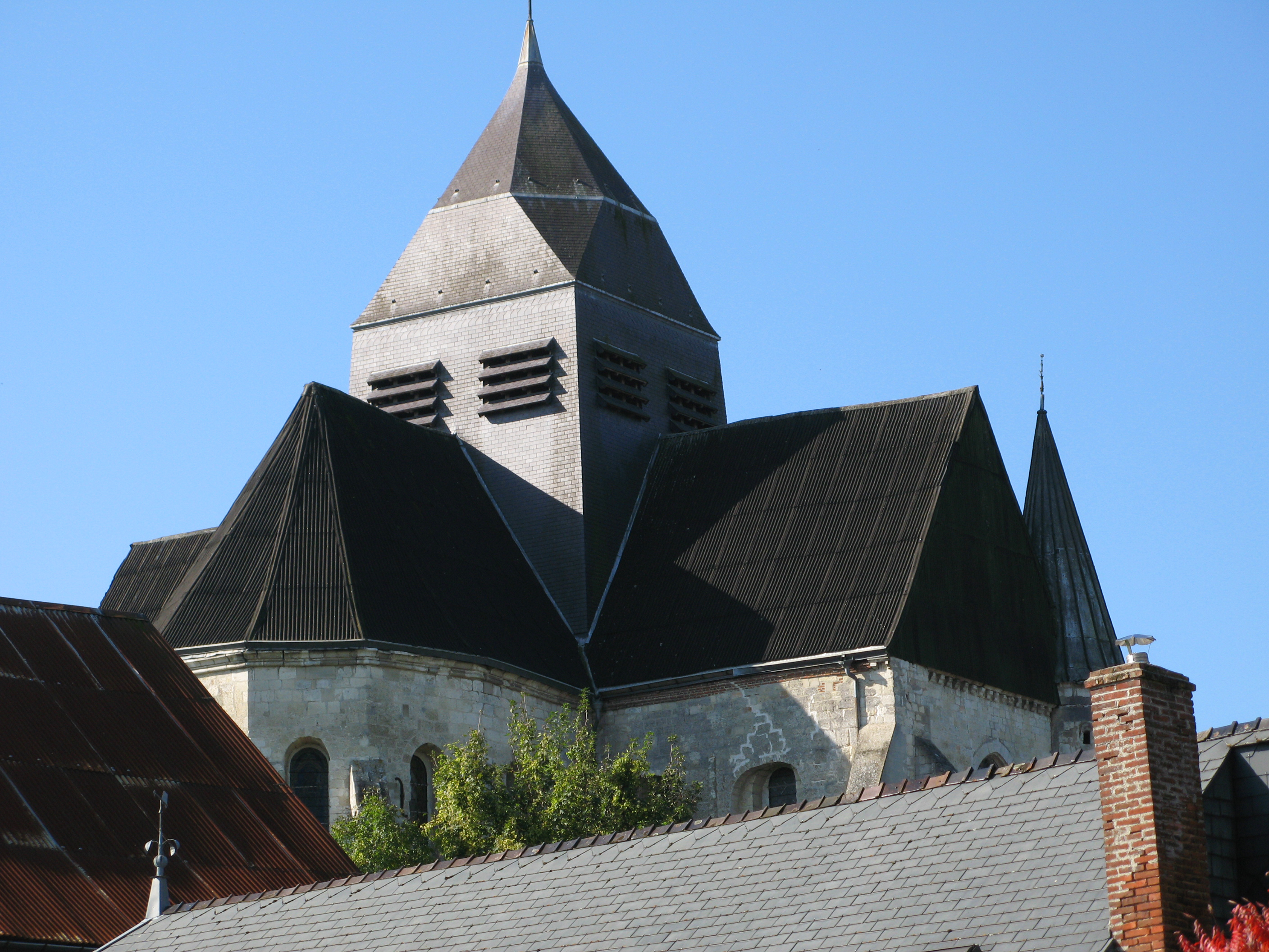 Rozoy-sur-Serre (Aisne, France) - Le chevet et le transept (vus du Nord-Est) de l'église fortifiée.